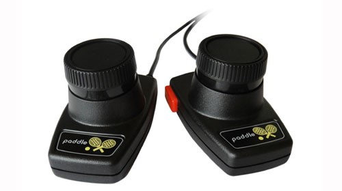 P-01. Atari 2600 üçün iki kürəkcik